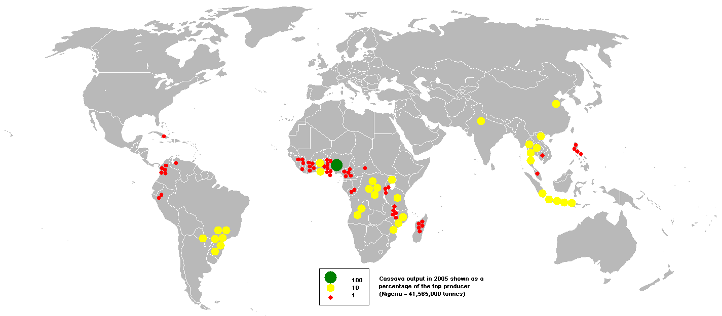 Cassava output in 2005